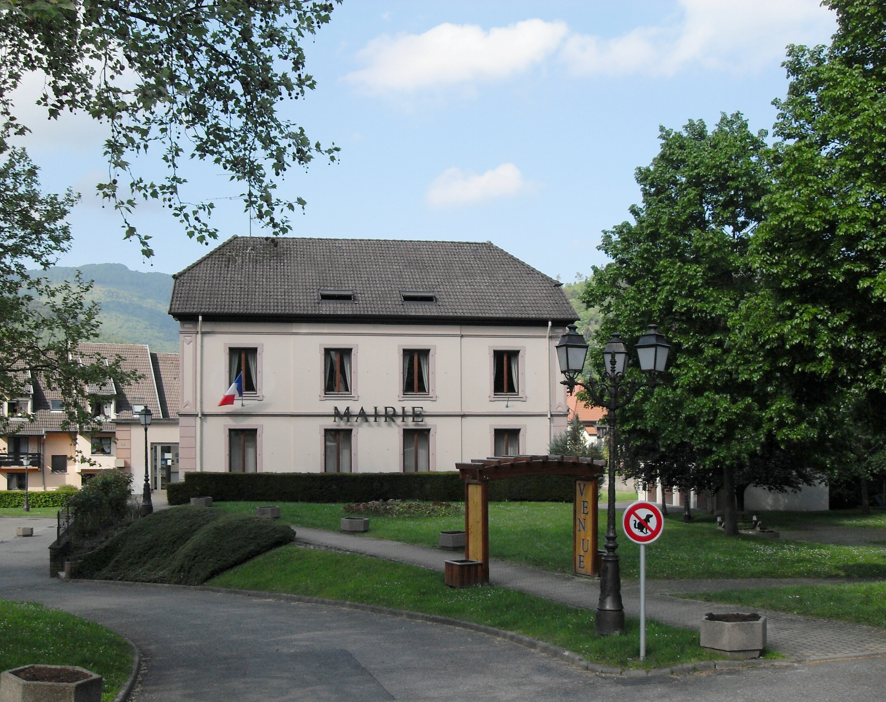 La mairie de Moosch